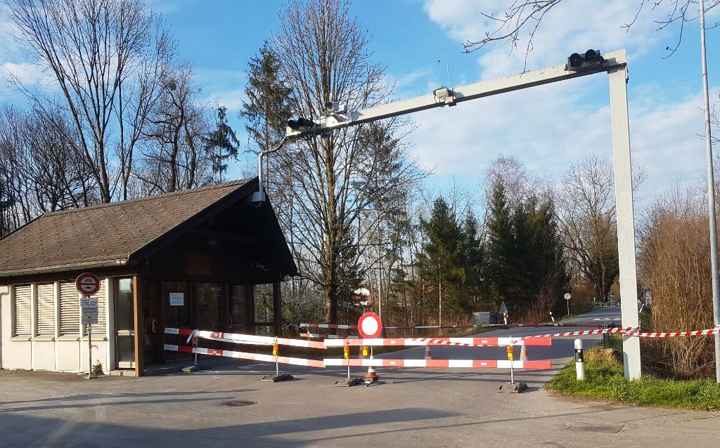 Da Zoll im Schmeatter ischt am Ziischtig, 17. März 2020 wäge da Corona-Kriisa zuegmacht wore.